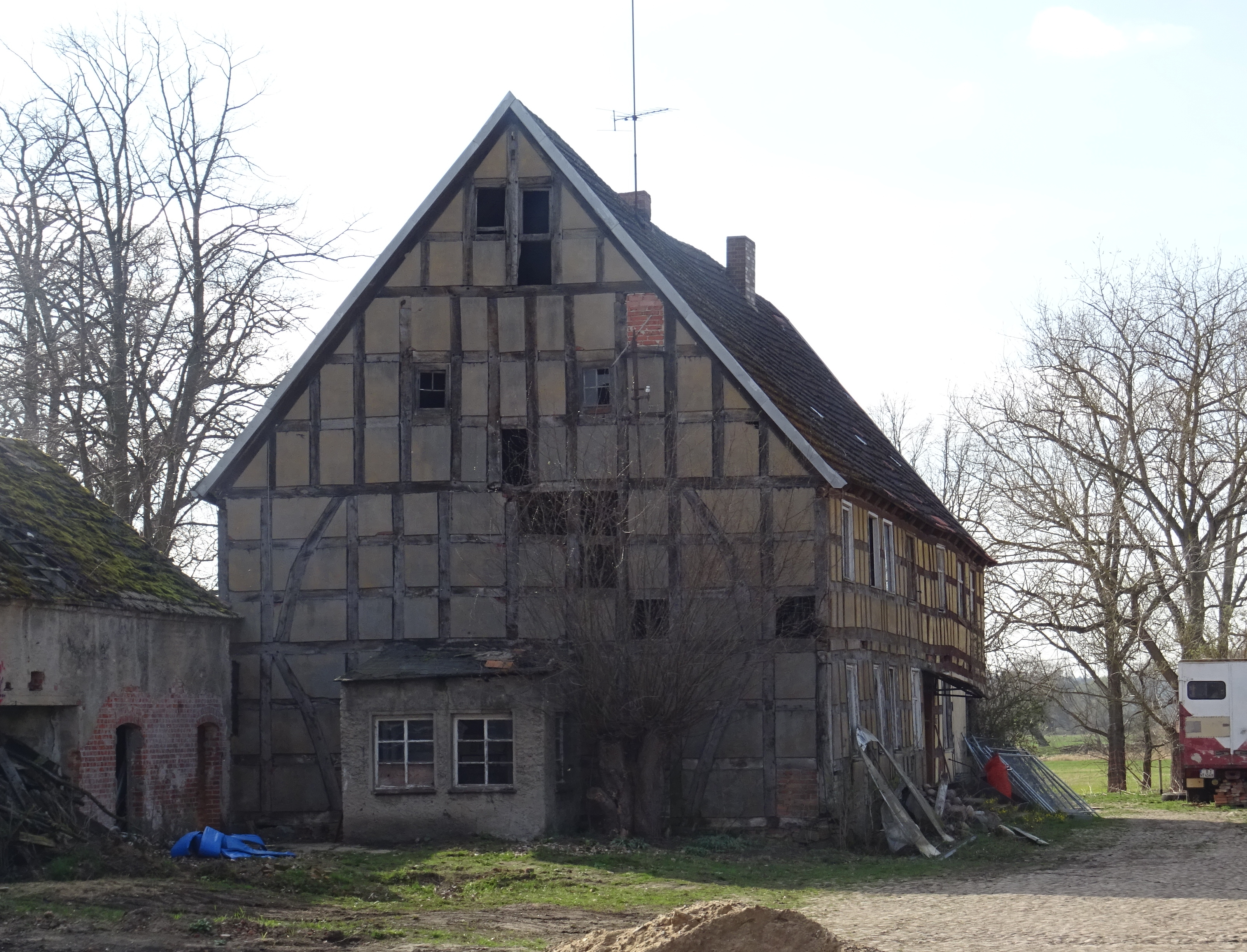 Dobbrun, Ortsteil von Osterburg, denkmalgeschützter Bauernhof Dorfstraße 34/35